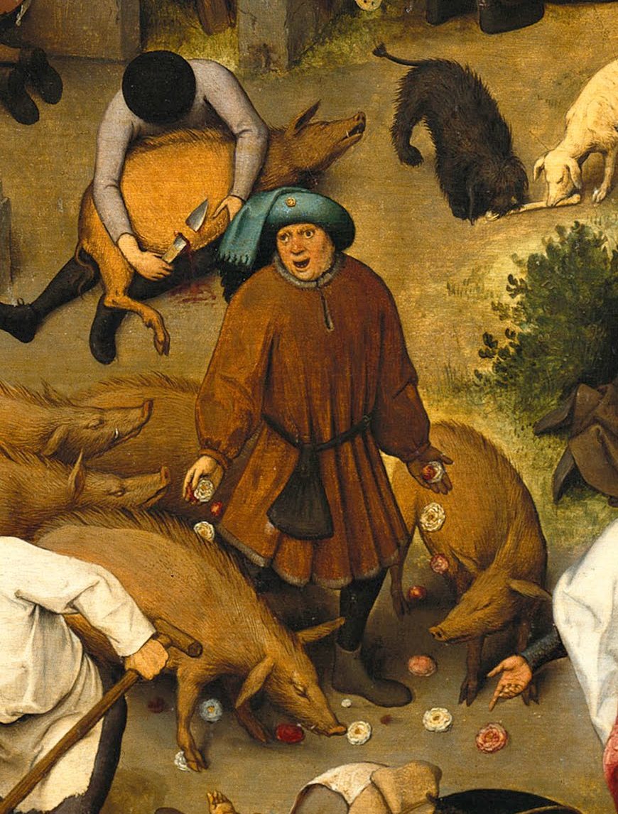 Mitte: Rosen vor die Säue werfen (Verschwendung an Unwürdige).[1] Oben links: Das Schwein ist durch den Bauch gestochen (Etwas ist unwiderruflich entschieden). Oben rechts: Zwei Hunde an einem Bein (Knochen) kommen selten überein. Ausschnitt aus Die niederländischen Sprichwörter.